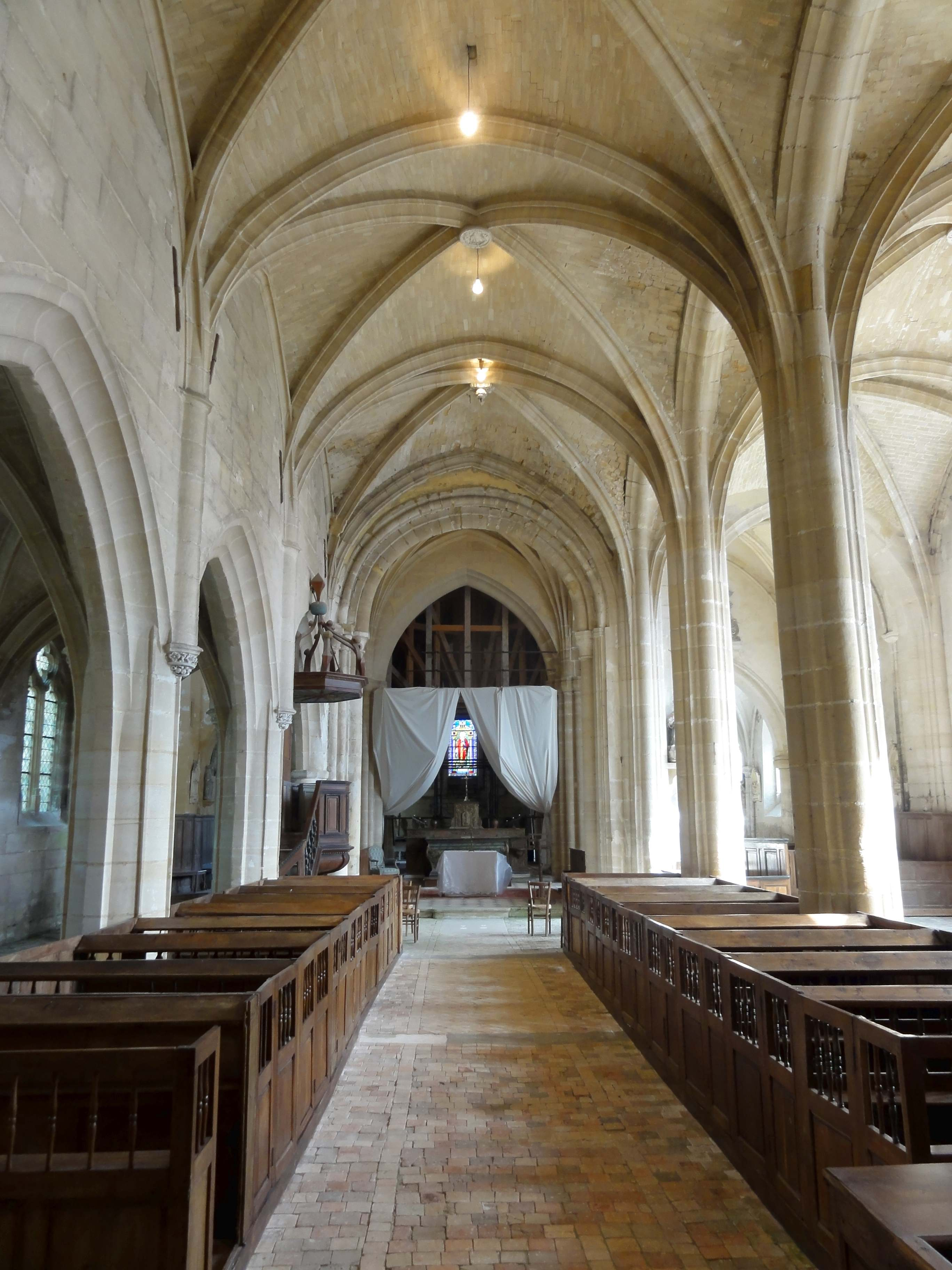 Nef - voir le titre du fichier.